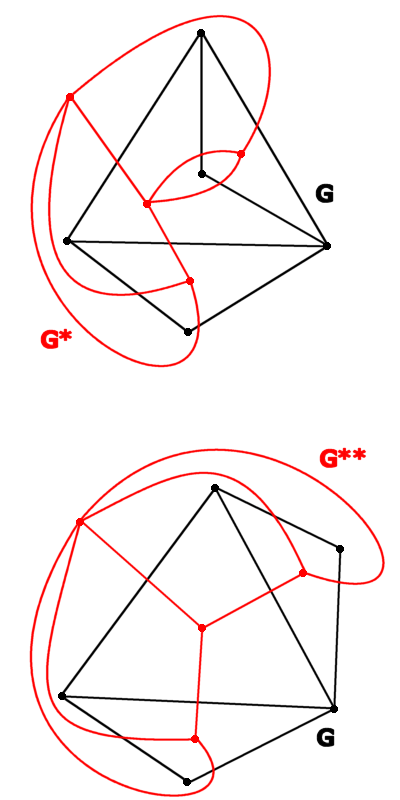 Nieizomorficzny graf dualny